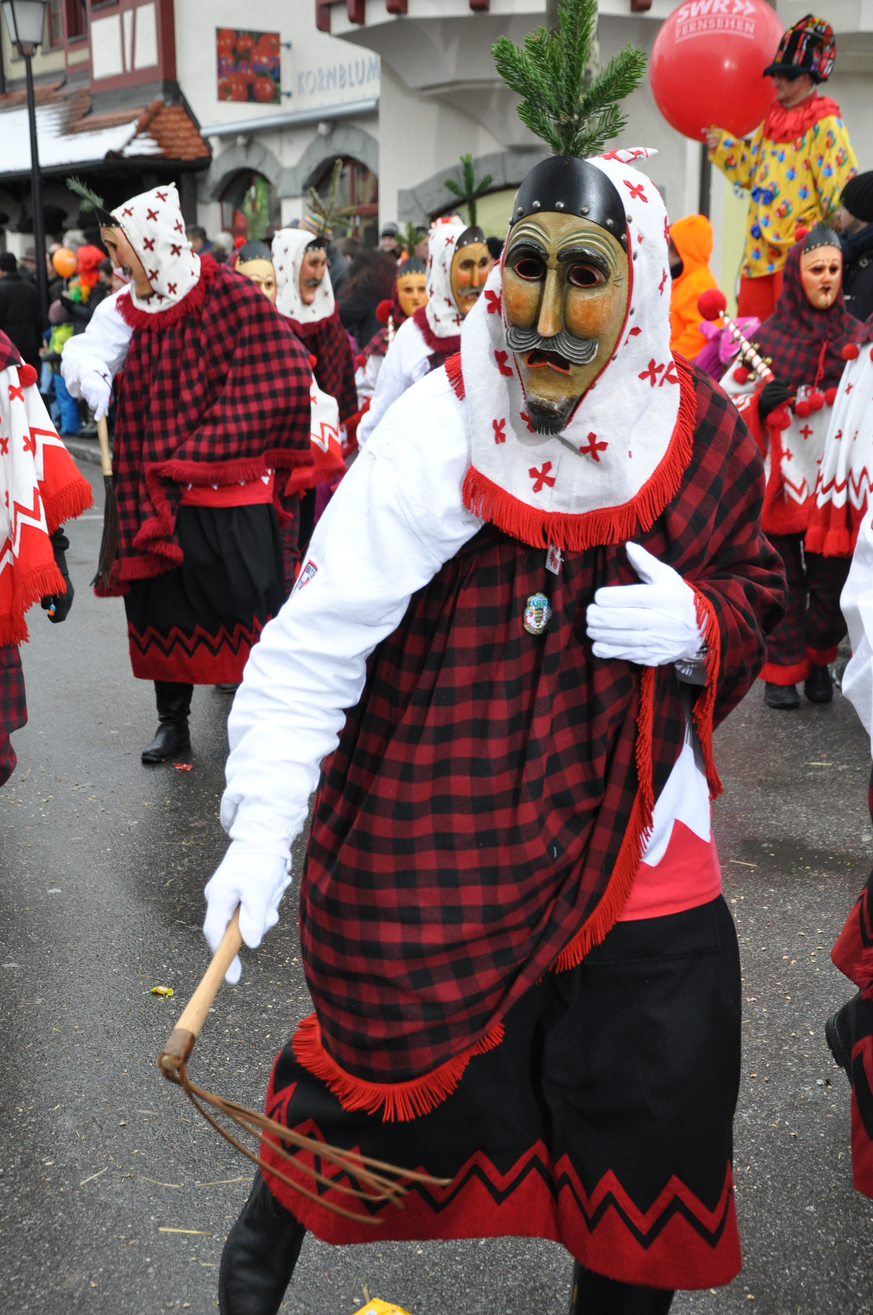 Butzenzunft Hirrlingen; Narrenfigur: Butz Fotografiert beim Landschaftstreffen der Vereinigung Schwäbisch-Alemannischer Narrenzünfte (VSAN) 2015 in Weingarten; Narrensprung am Sonntag, 25. Januar 2015